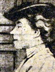 Maria Isidorovna Goldsmith ou Marie Goldsmith, née en 1871 à Saint-Pétersbourg (Russie) et suicidée le 11 janvier 1933 à Paris, est une biologiste, préparatrice au Laboratoire de zoologie de la Sorbonne, et militante anarchiste. Secrétaire de L'Année biologique de 1902 à 1919, elle collabore à la presse libertaire sous les pseudonymes de Maria Korn ou Corn ou Isidine.